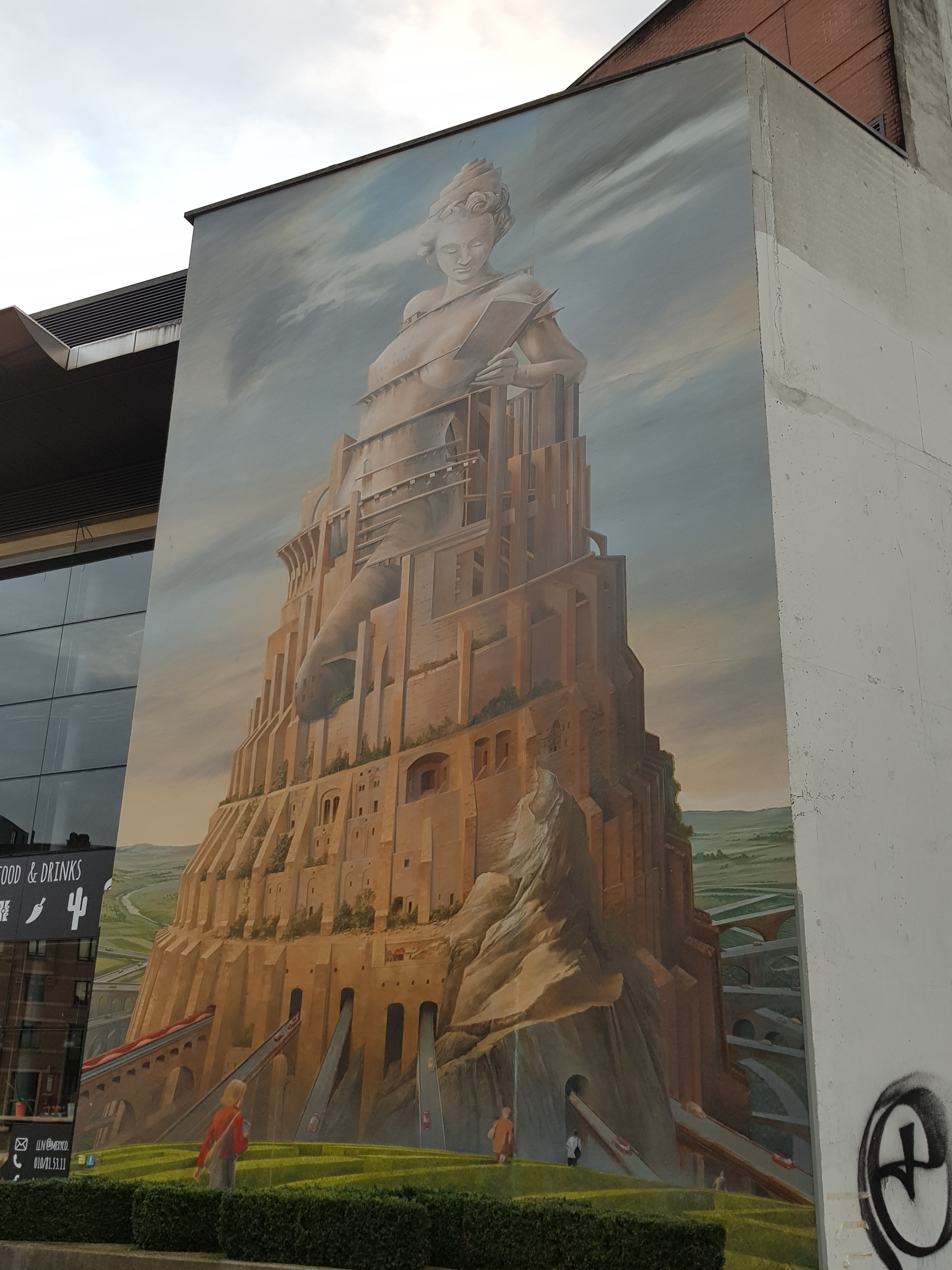 Grand-Place de Louvain-la-Neuve, Belgique